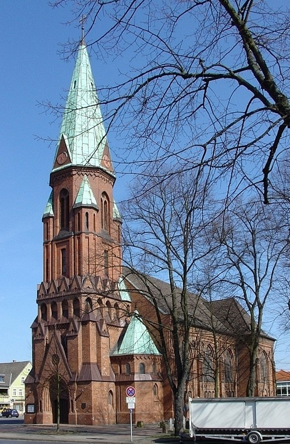 Beschreibung: Matthäuskirche in Lehrte, Architekt: Conrad Wilhelm Hase *Quelle: selbst fotografiert, März 2005 *Fotograf oder Zeichner: Silberchen 21:33, 13. Apr 2005 (CEST) * 18:11, 21. Mär 2005 Silberchen 768 x 1024 (435.667 Byte) (Matthäuskirche in Lehrte)